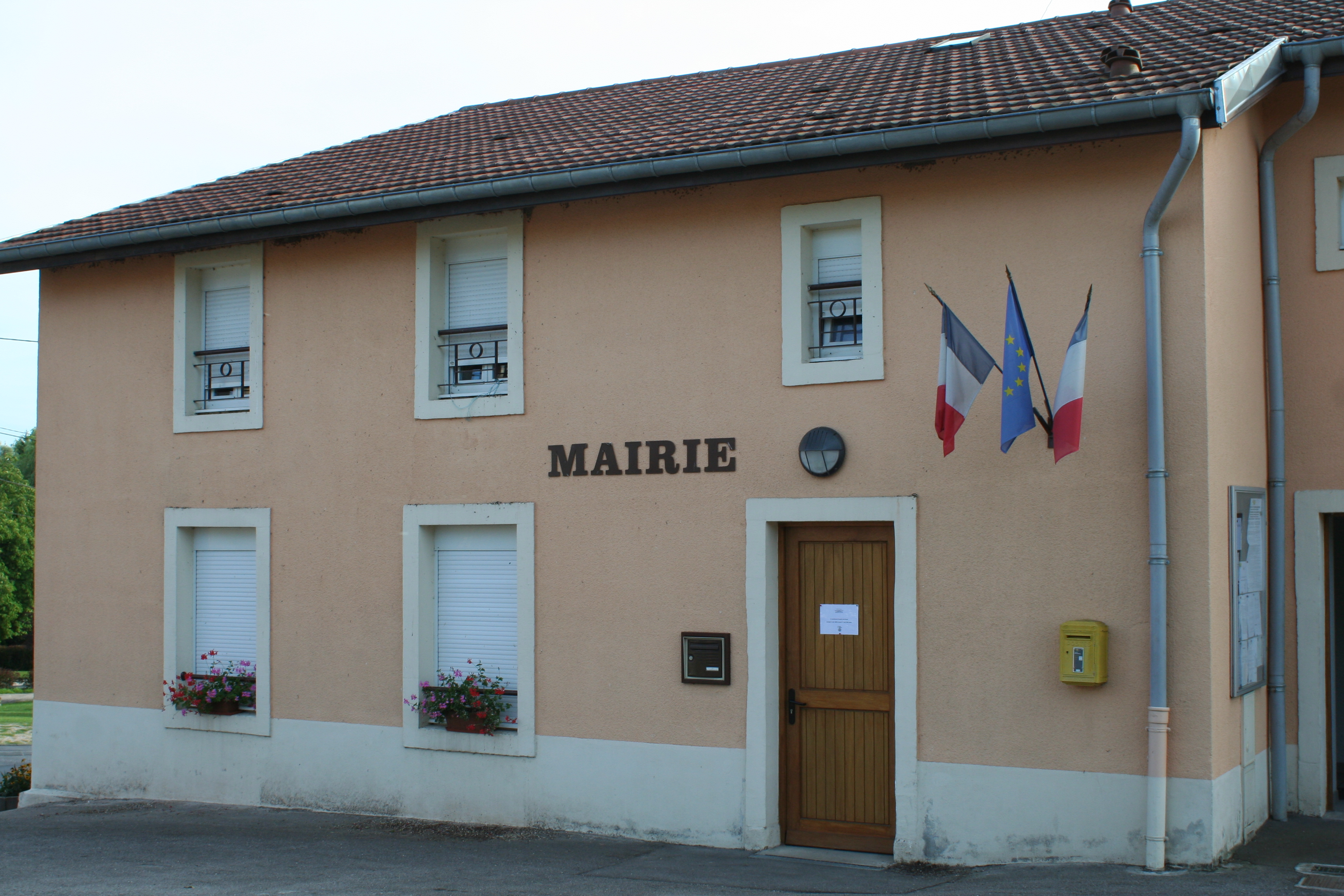 Mairie de Badménil-aux-Bois (Vosges)